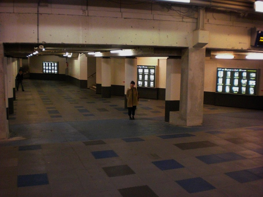 CS Amsterdam